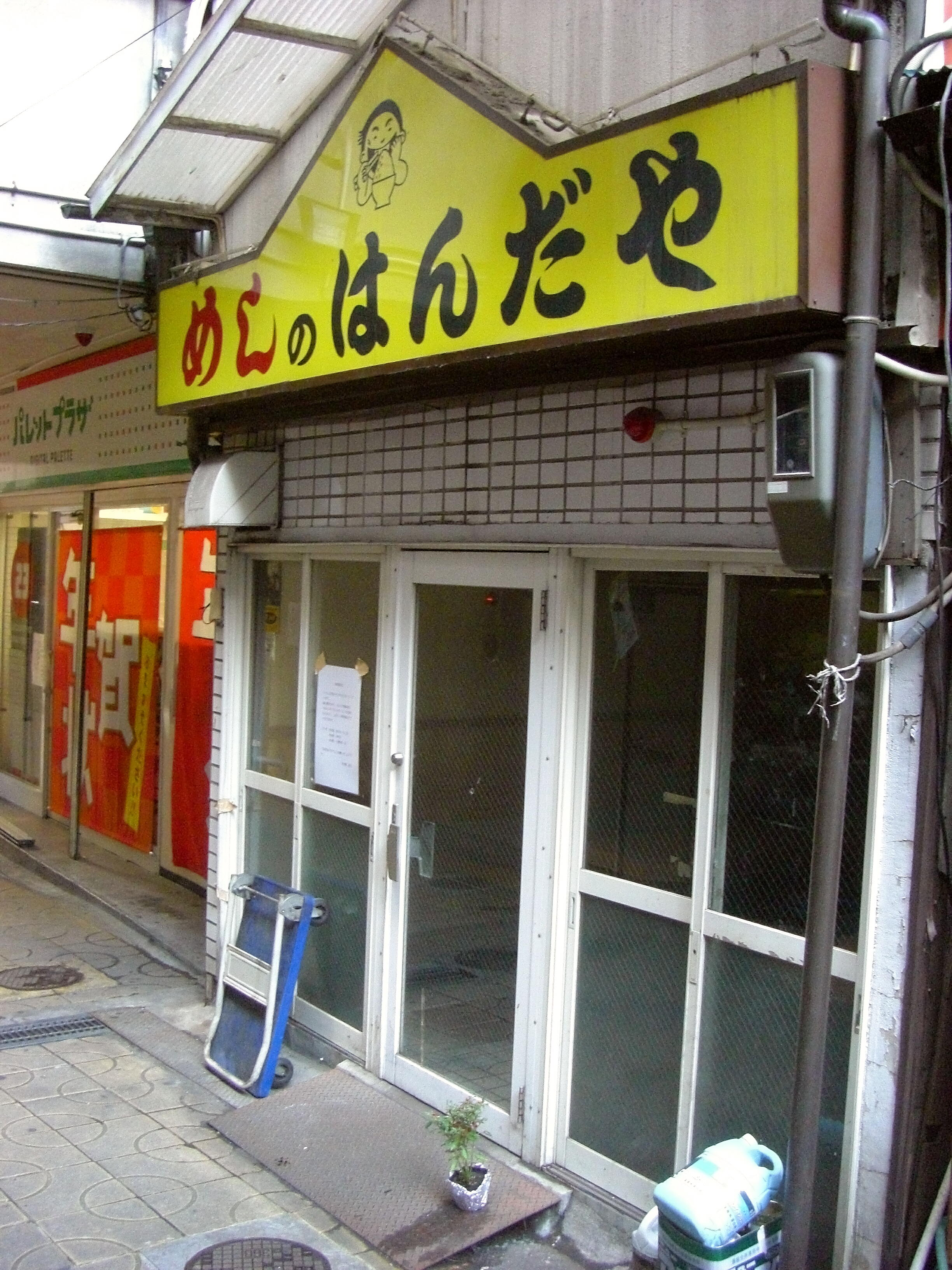 めしのはんだや仙台駅前店跡